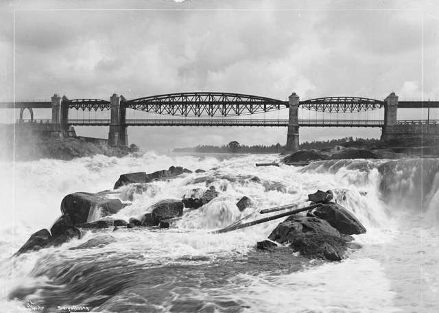 Sarpfossen in Sarpsborg.